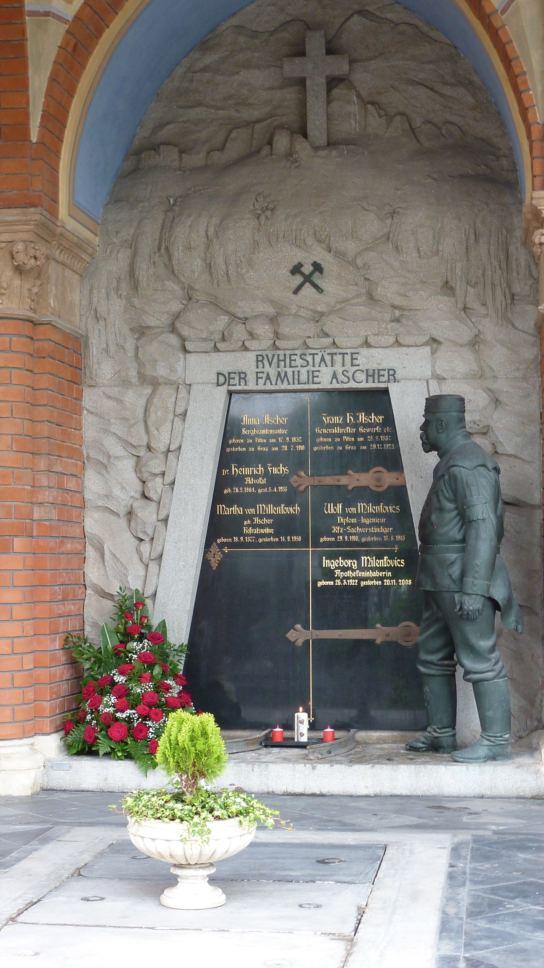 Grabstätte Wolf von Milenkovics